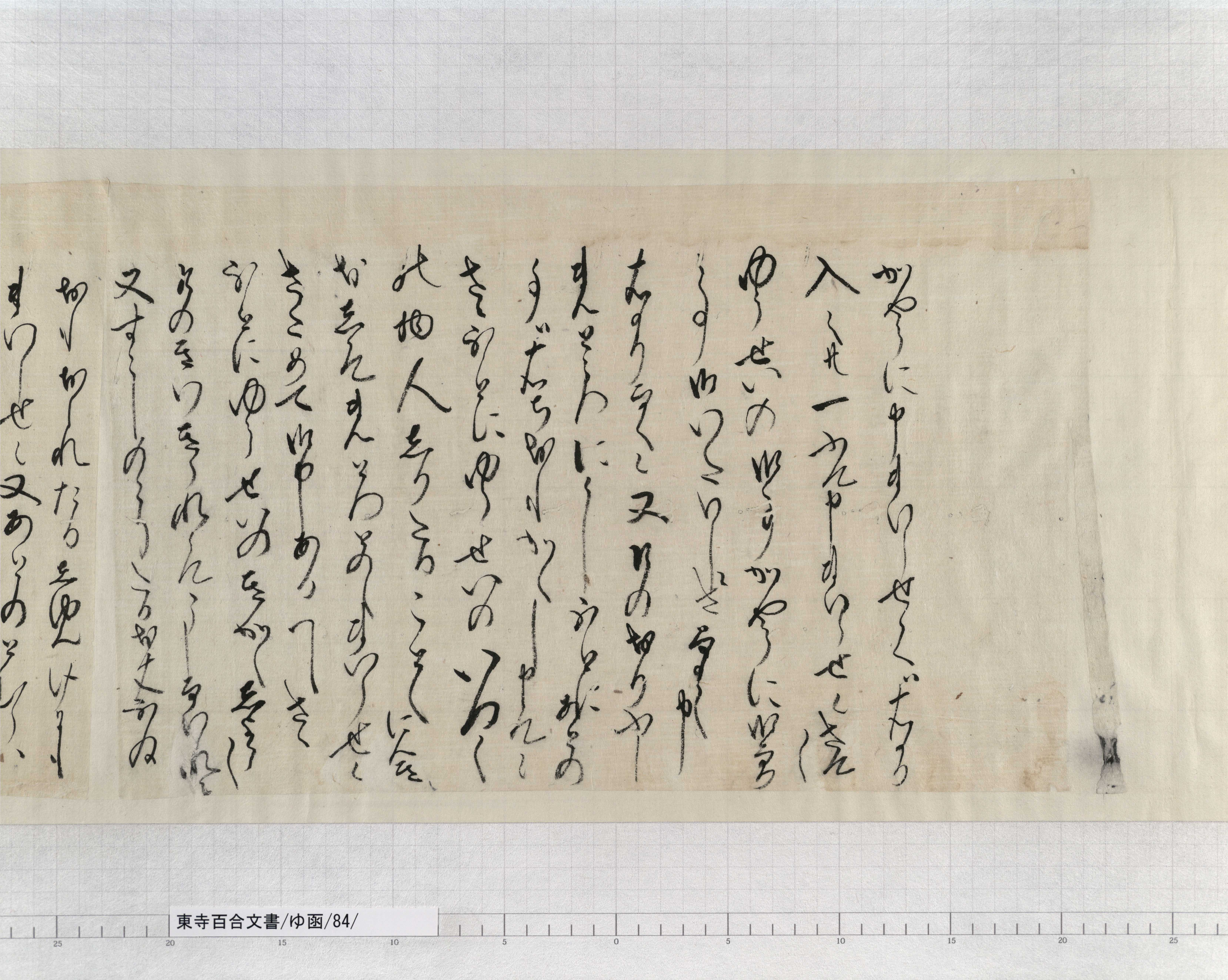 東寺百合文書ゆ函84文書名たまかき書状并備中国新見庄代官祐清遺文01